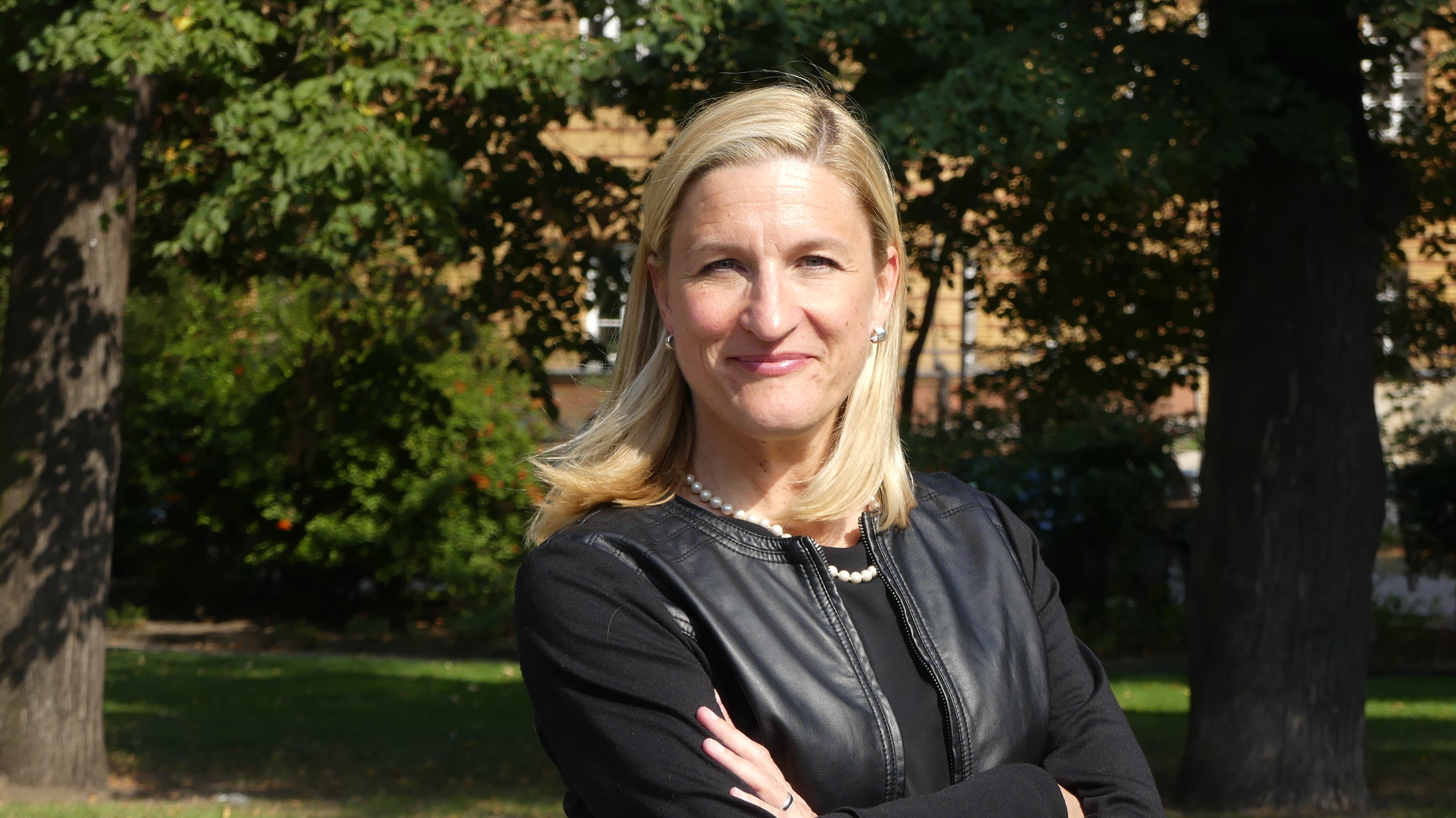 Ruta Sepetys on September 9, 2016 on the forecourt of Haus der Berliner Festspiele in Berlin, during her participation in the section International Children´s and Young Adult Literature of the 16th international literature festival berlin